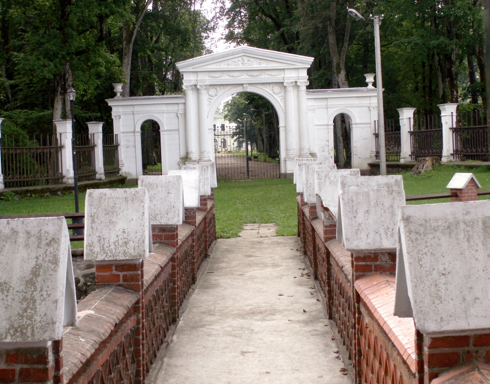 Švėkšnos dvaro tiltas ir vartai